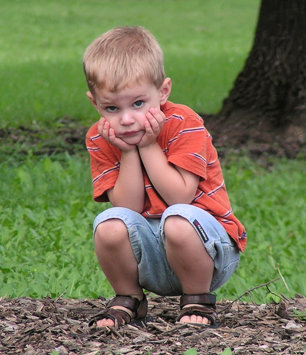 young boy squatting in a park